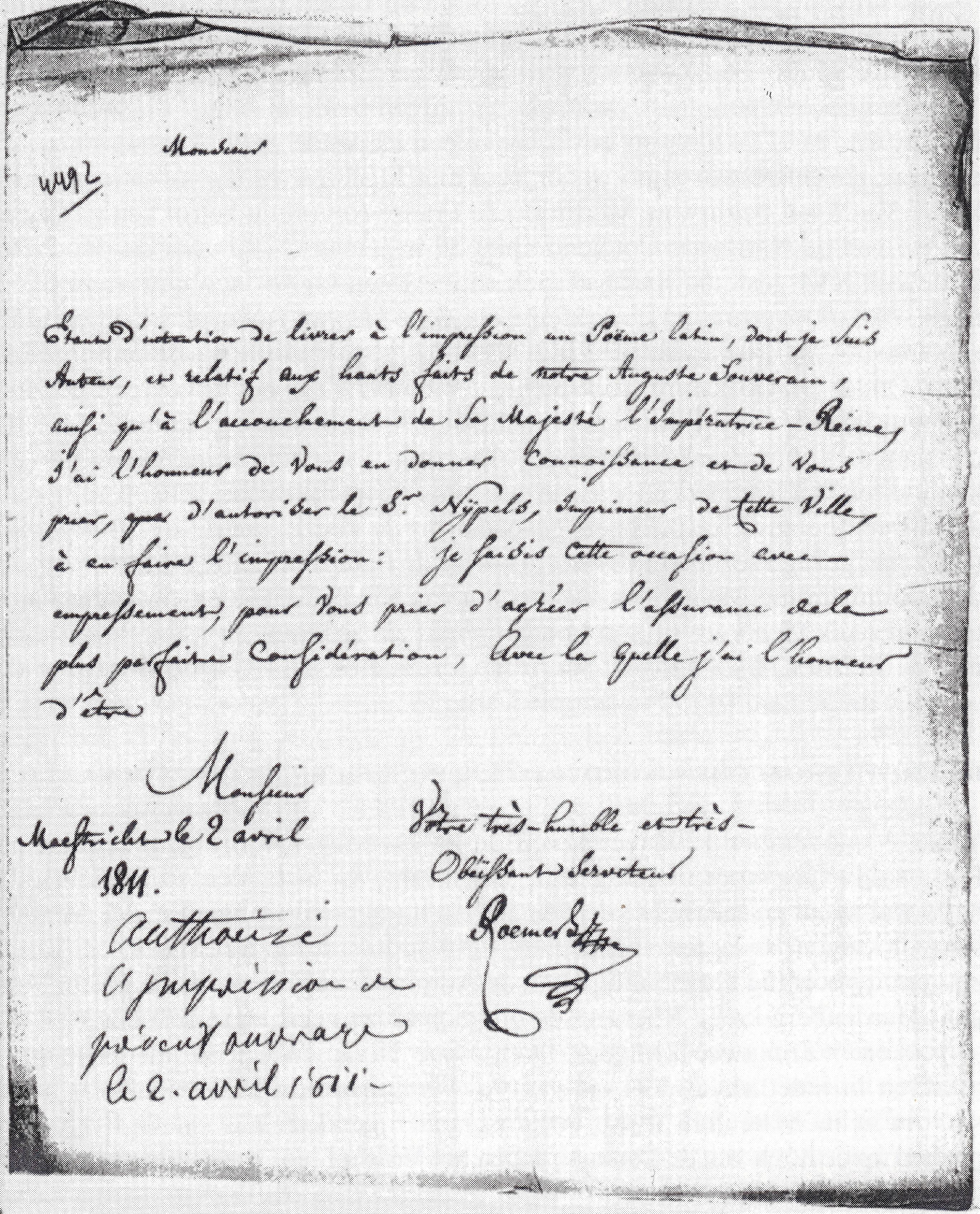 Brief van Charles Roemers uit 1811 aan de auditeur en onderprefect De Rhoer te Maastricht met het verzoek om een Latijns lofdicht op de grote daden van Napoleon te mogen publiceren. Collectie RHCL Maastricht, RAL, FA, inv.nr. 4492.